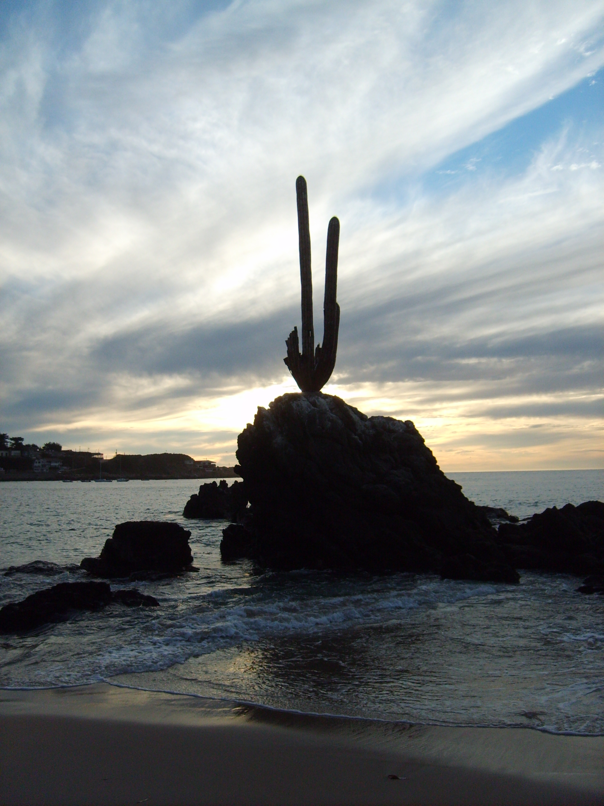 Escultura metálica de un quisco, construída sobre una roca en la playa principal de la comuna de El Quisco, Valparaiso, Chile.